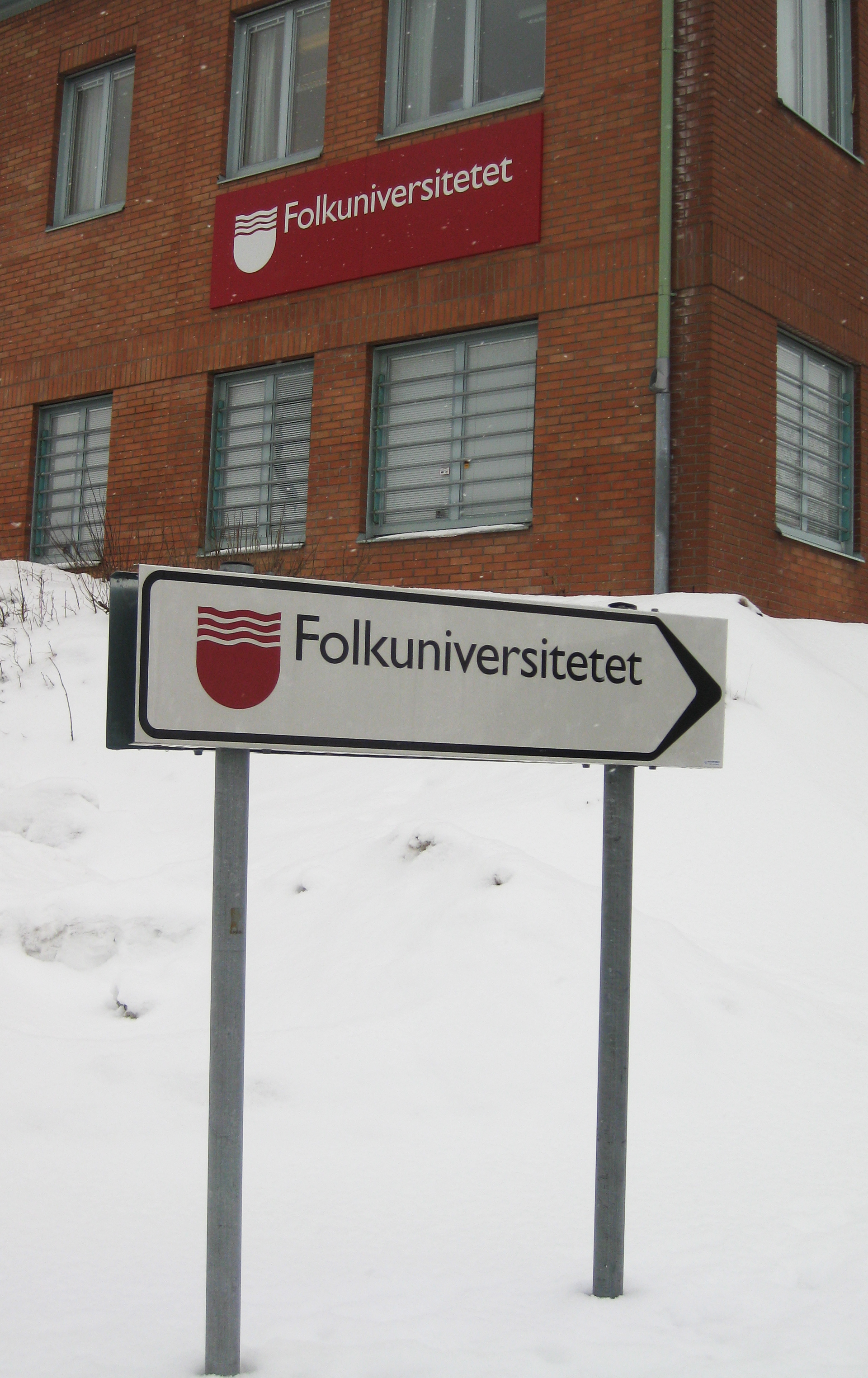 Två Folkuniversitetetskyltar utanför Folkuniversitetets lokaler på Redegatan i Göteborg.